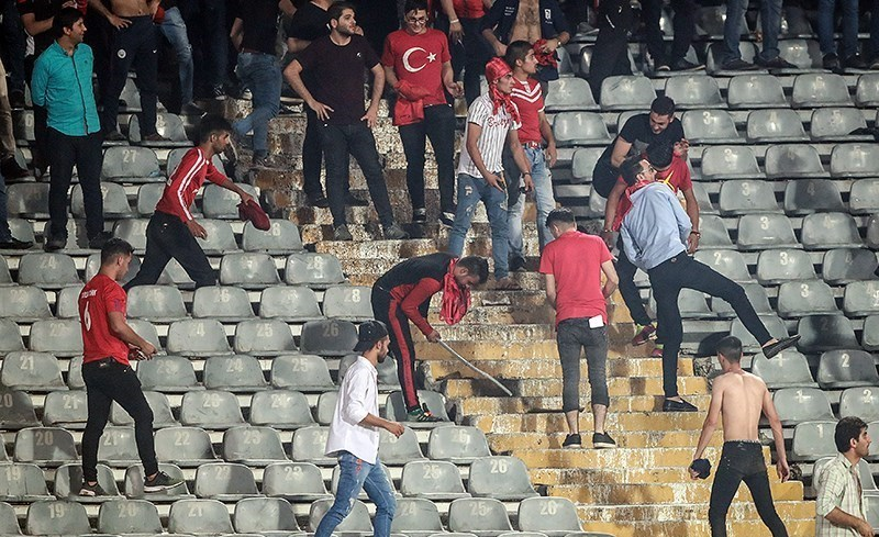 هواداران تیم فوتبال تراکتورسازی تبریز در مسابقه این تیم با استقلال تهران در ورزشگاه آزادی